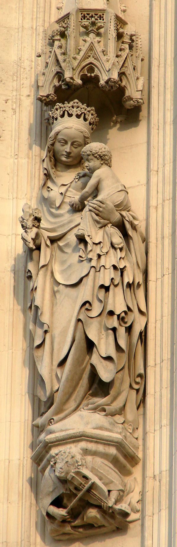 Vierge à l'Enfant (contrefort de la tour Nord), cathédrale d'Amiens (Somme).